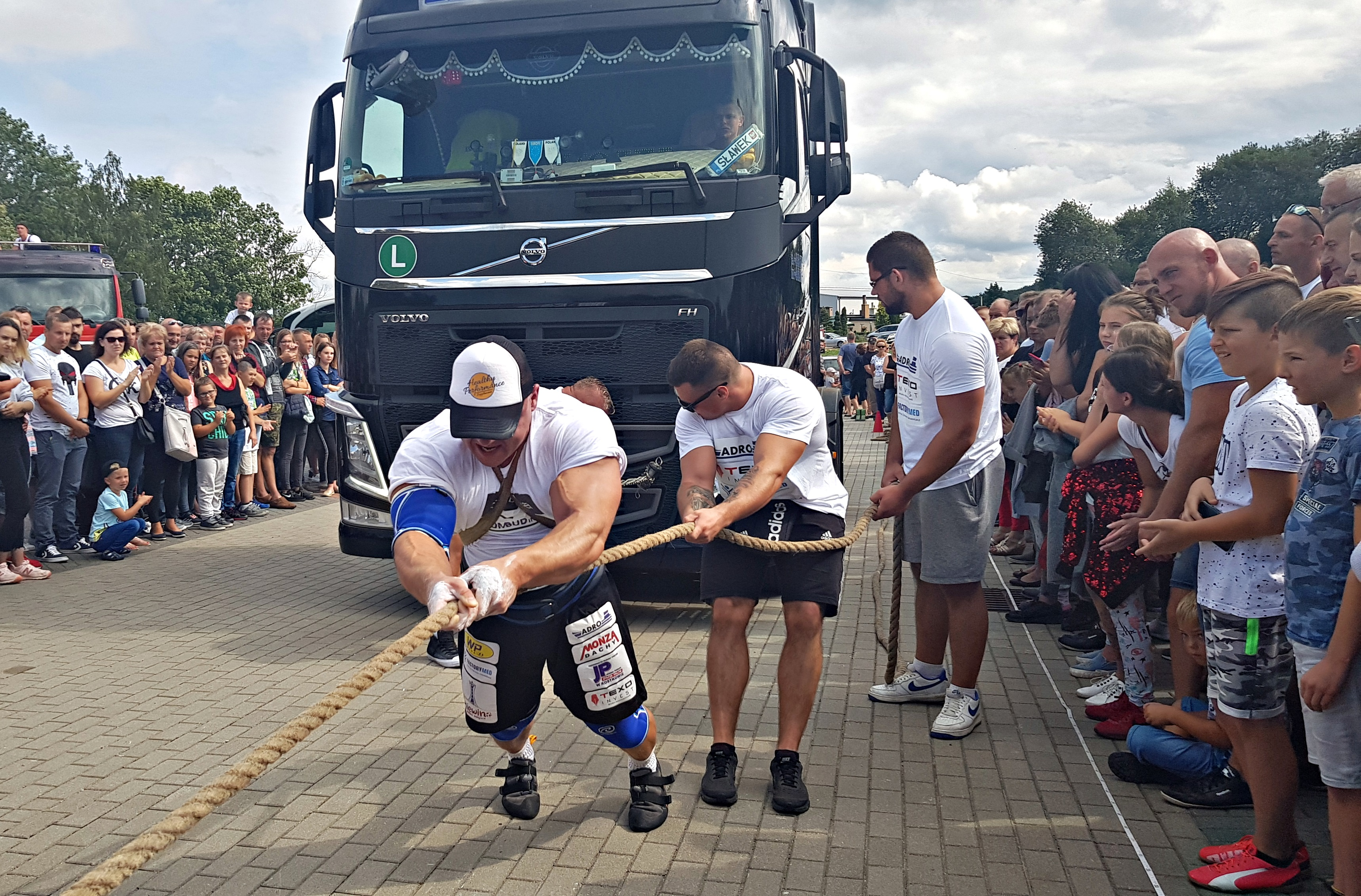 Międzynarodowy Puchar Polski Strongman Czymanowo 2018